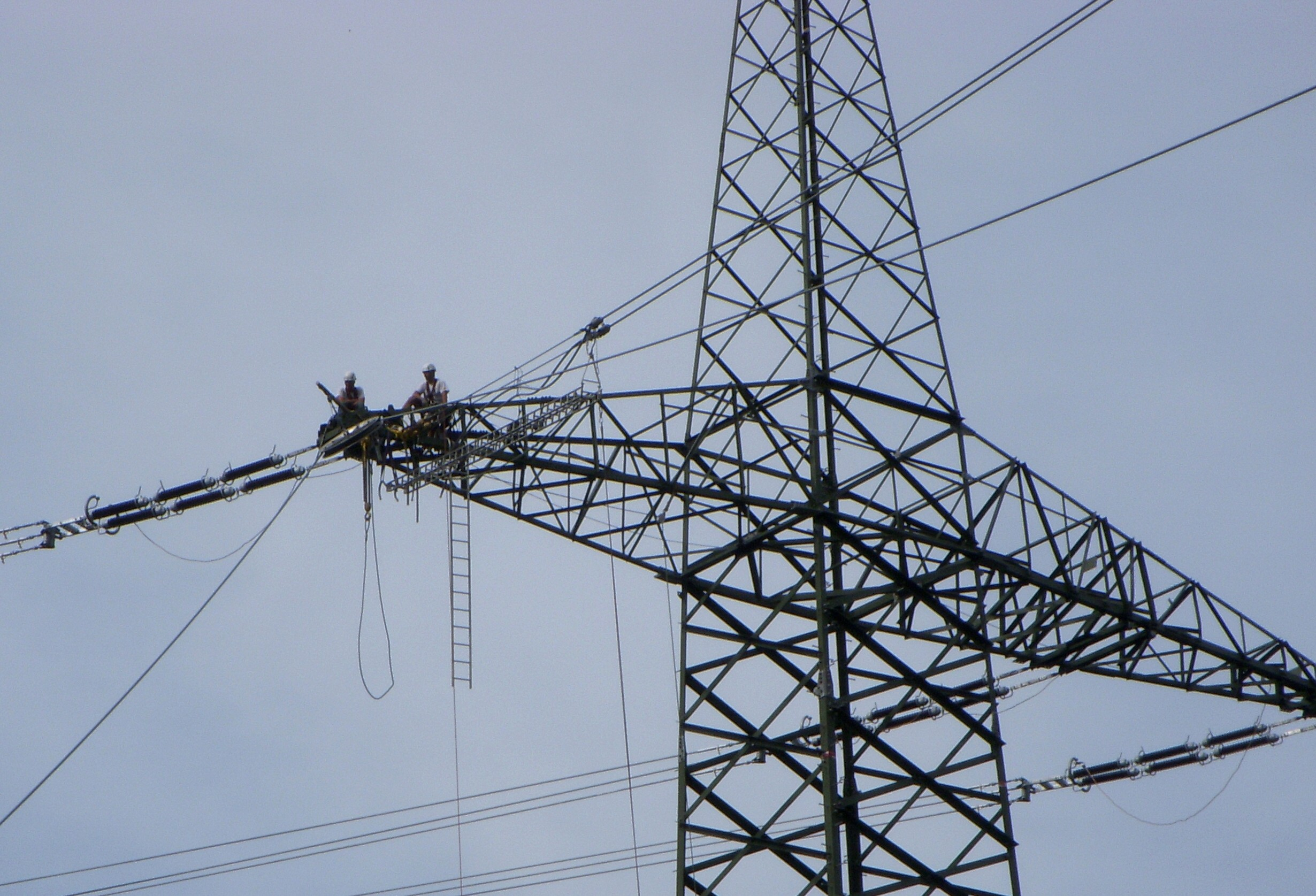 Arbeiten an einer Hochspannungsleitung bei Kaprun, Österreich